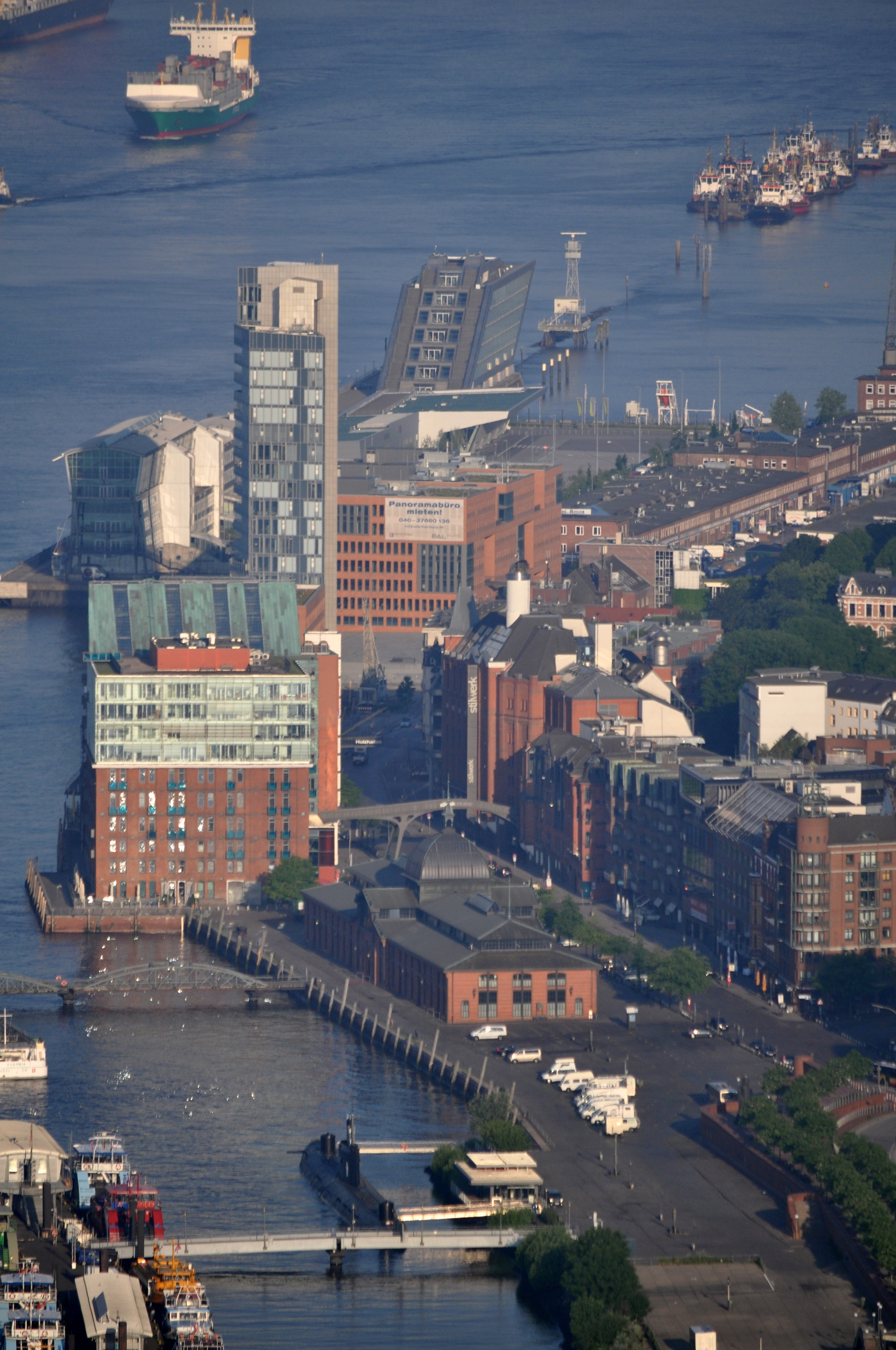 Große Elbstraße in Hamburg-Altona-Altstadt.